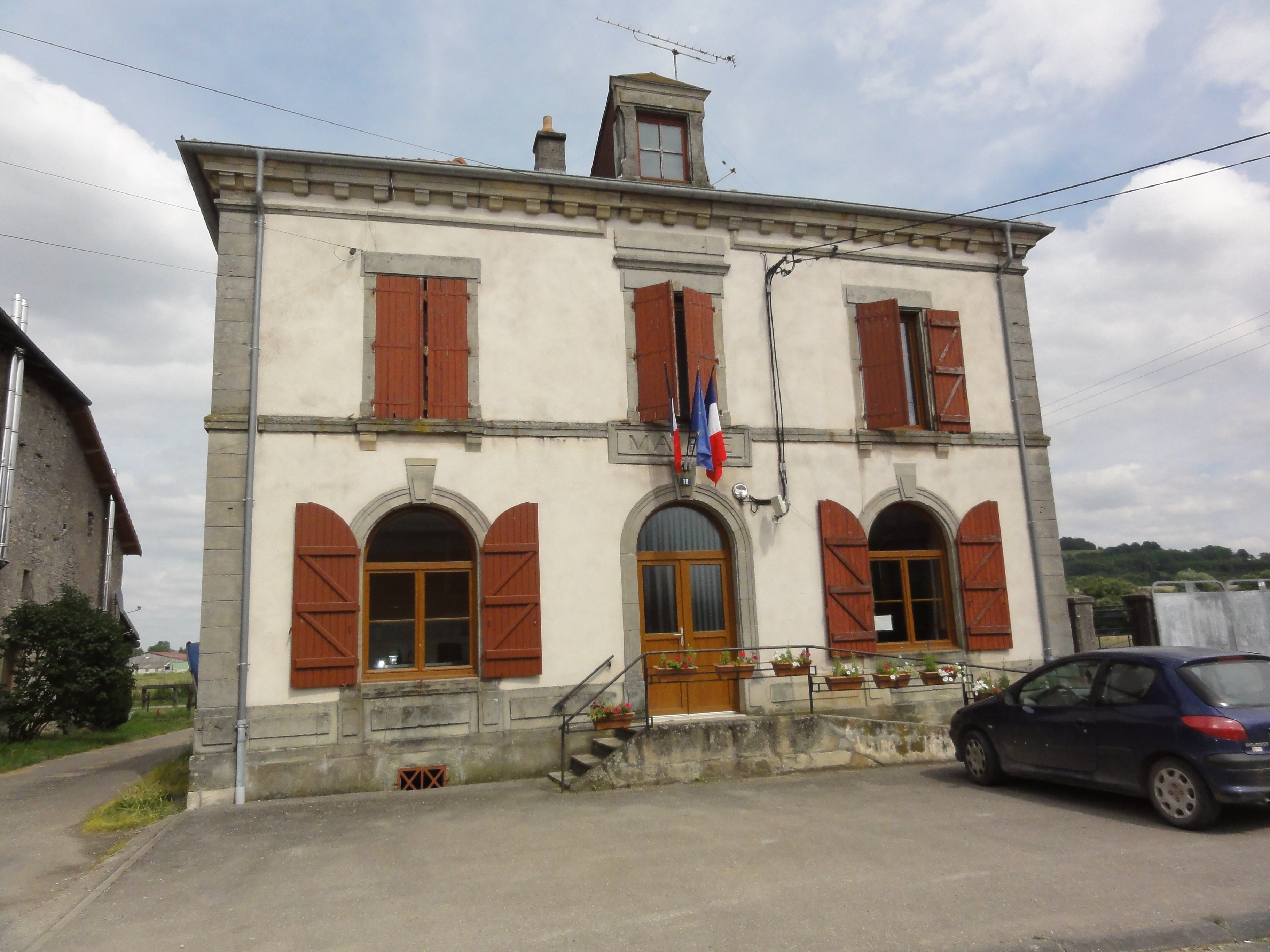 Saint-Boingt (M-et-M) mairie